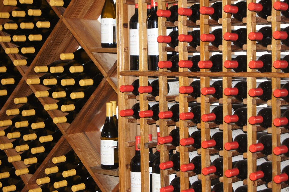 Vinos